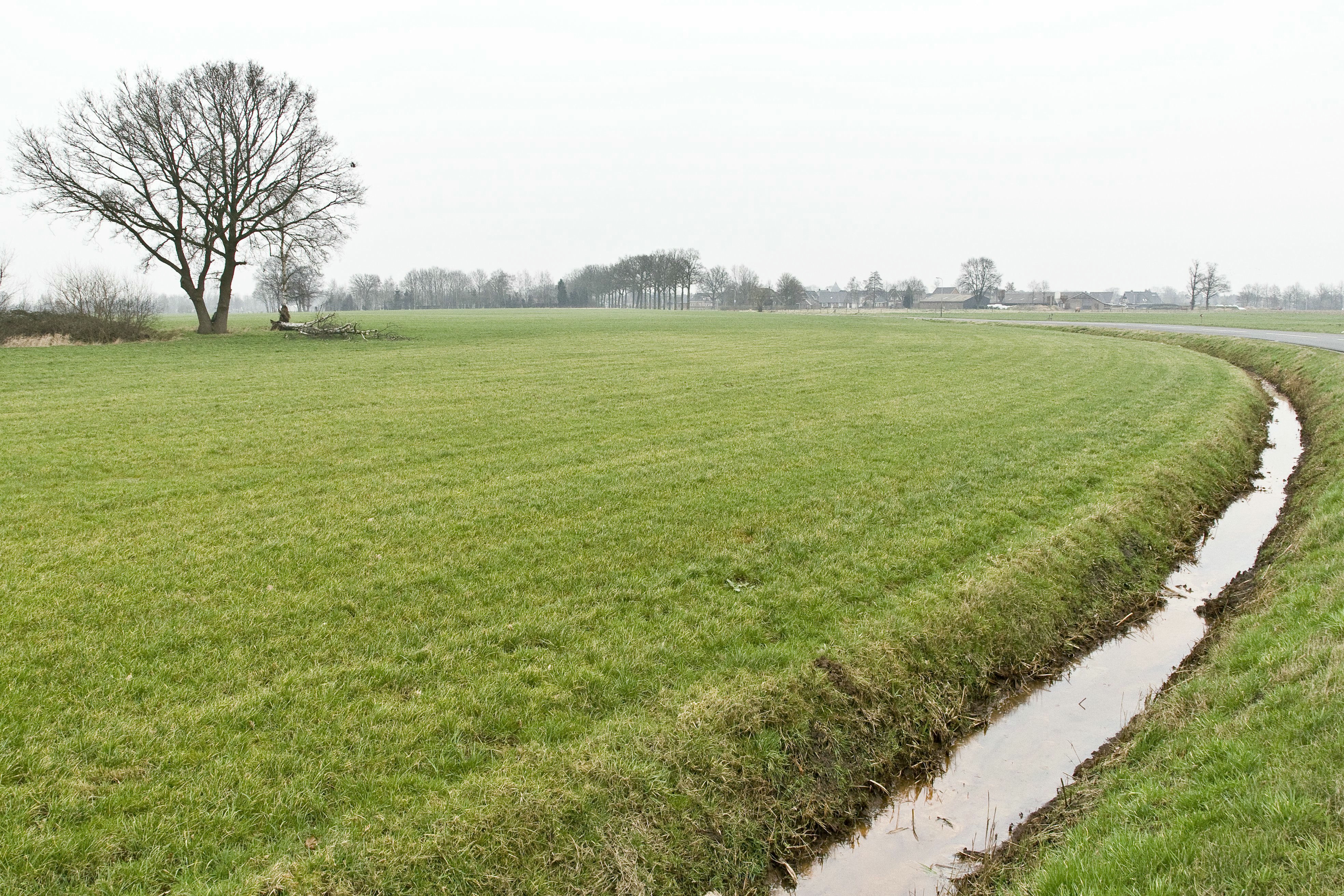 De Linderbeek: Overzicht landschap langs de Linderbeek (opmerking: Publicatie: Mens en land in het hart van Salland (Landschapsbiografie Oost-Nederland))